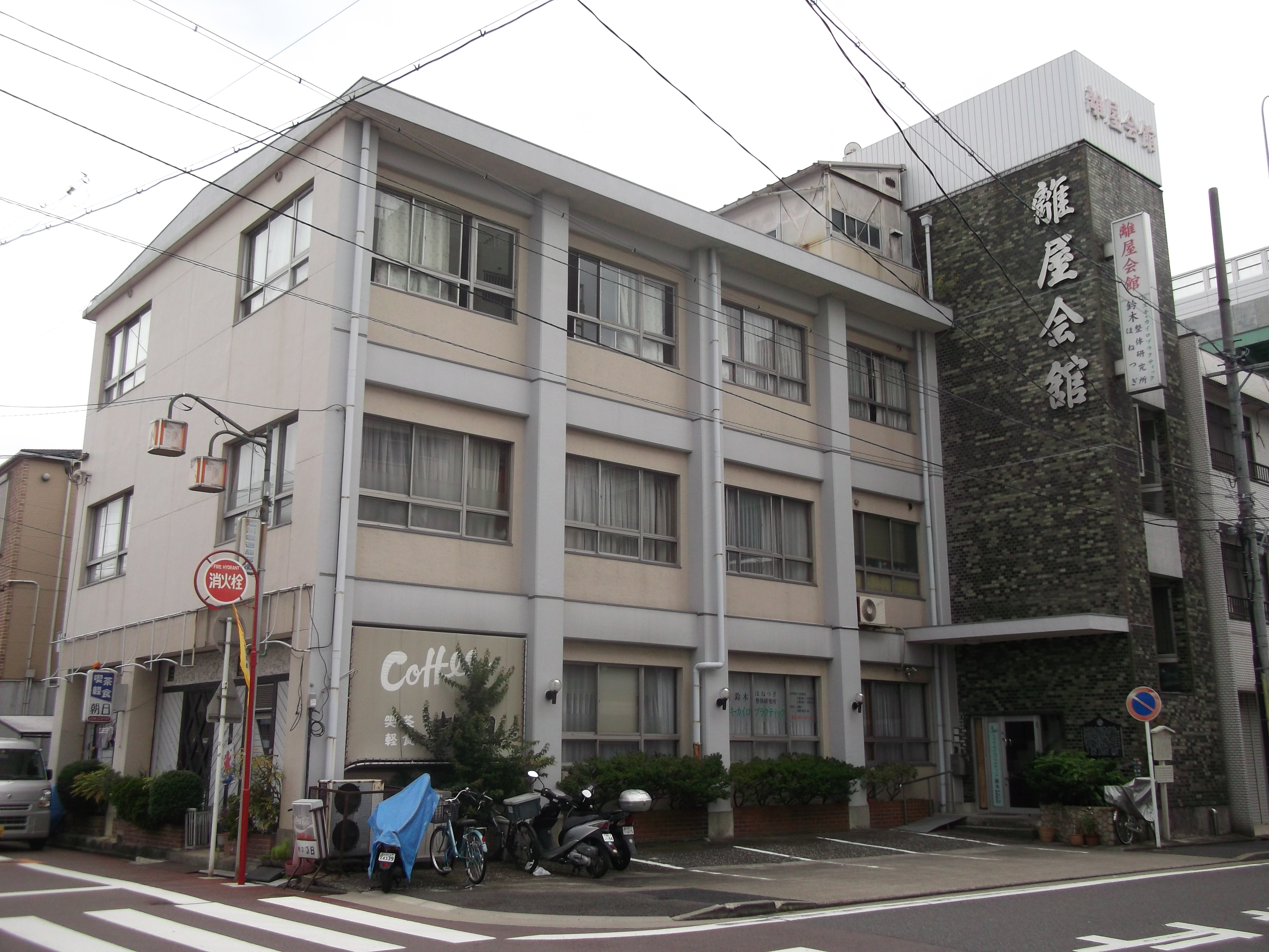 名古屋市西区城西に所在する離屋会館を北側公道東側より撮影